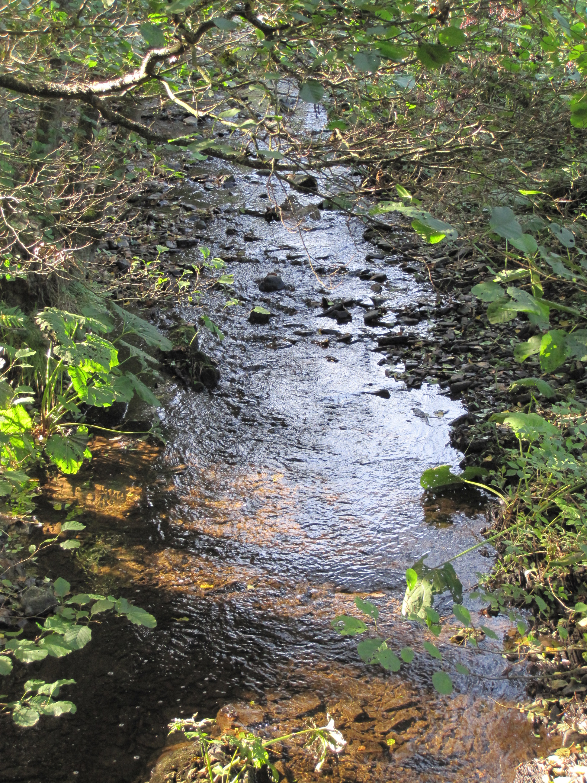 Sahrbach zwischen Burgsahr und Kreuzberg